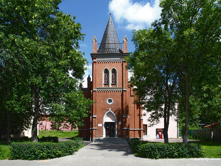 Полацк. Кірха